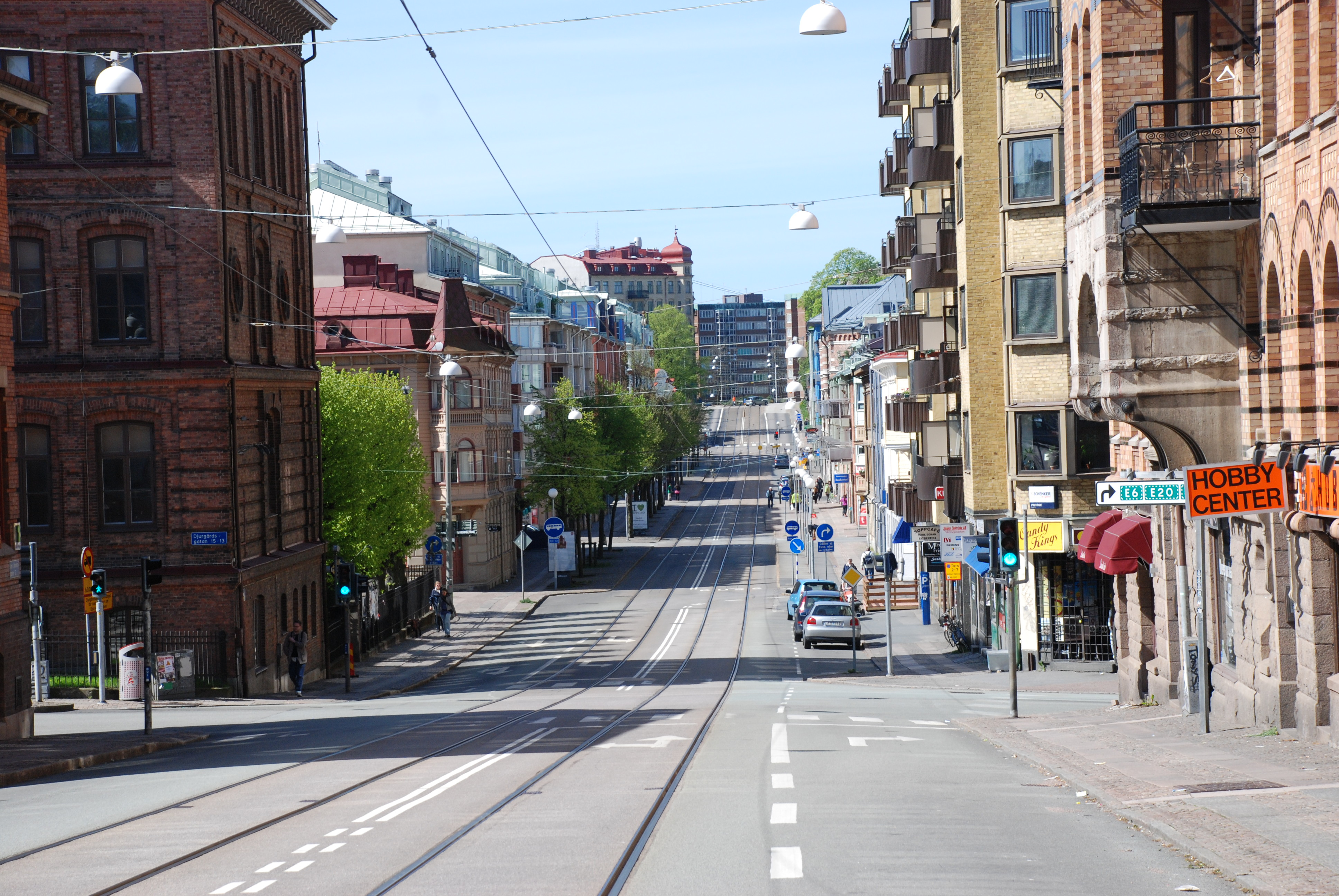 Karl Johansgatan i Göteborg sedd från Stigbergstorget.